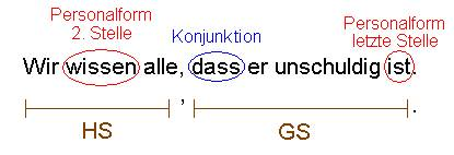 Privat von "Häsk" erstellt